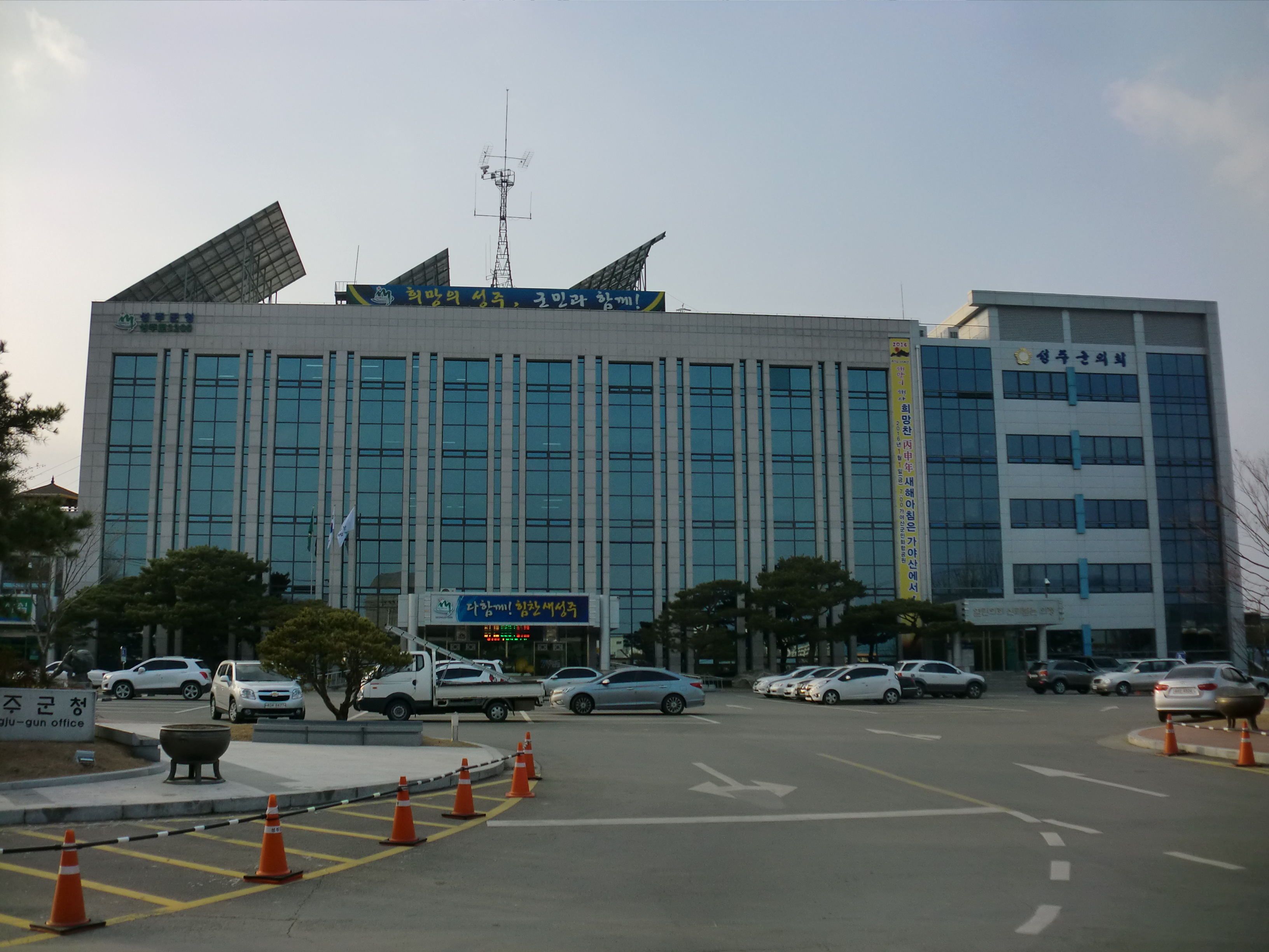 경상북도 성주군에 있는 성주군청